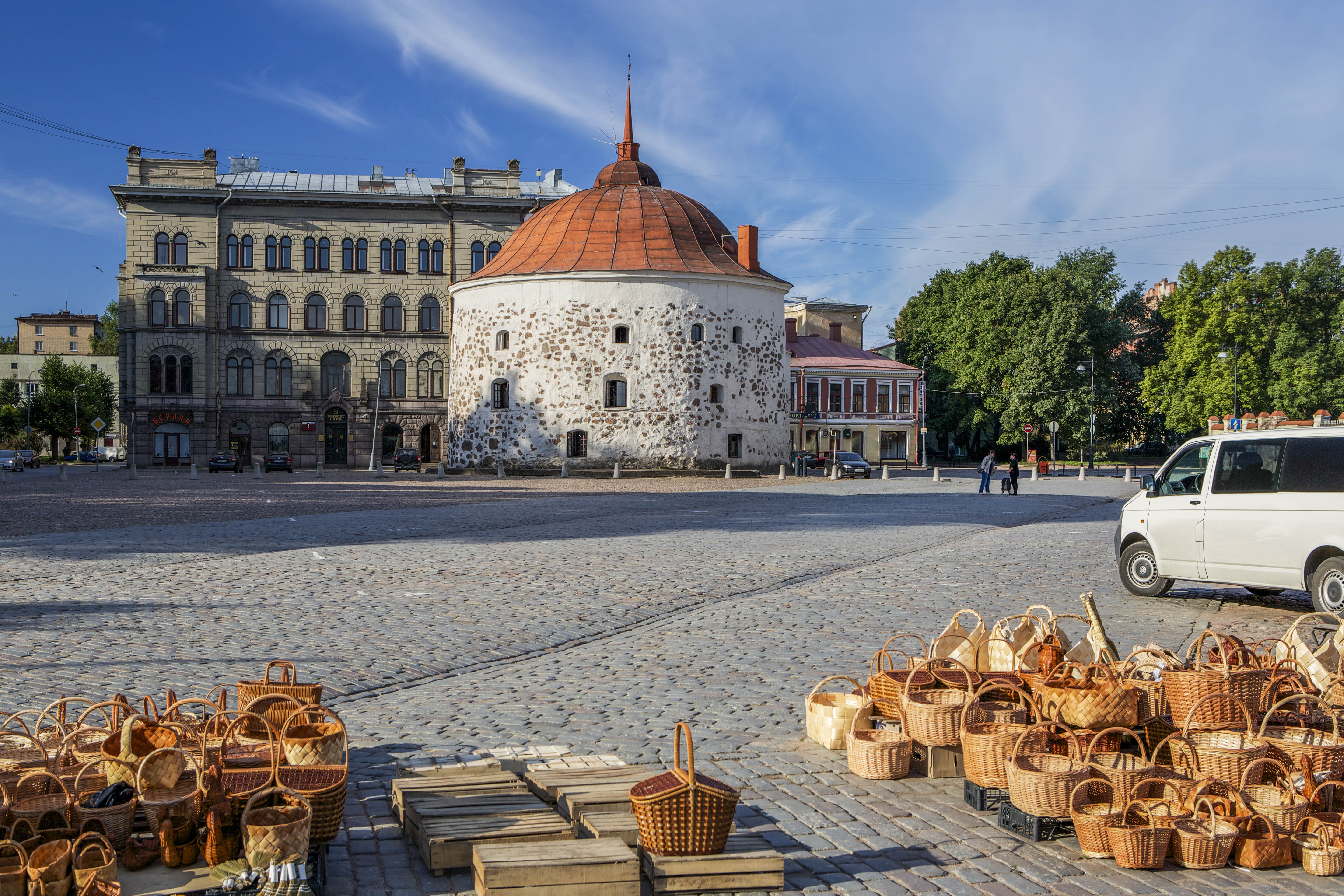 Pyöreä torni Viipuri